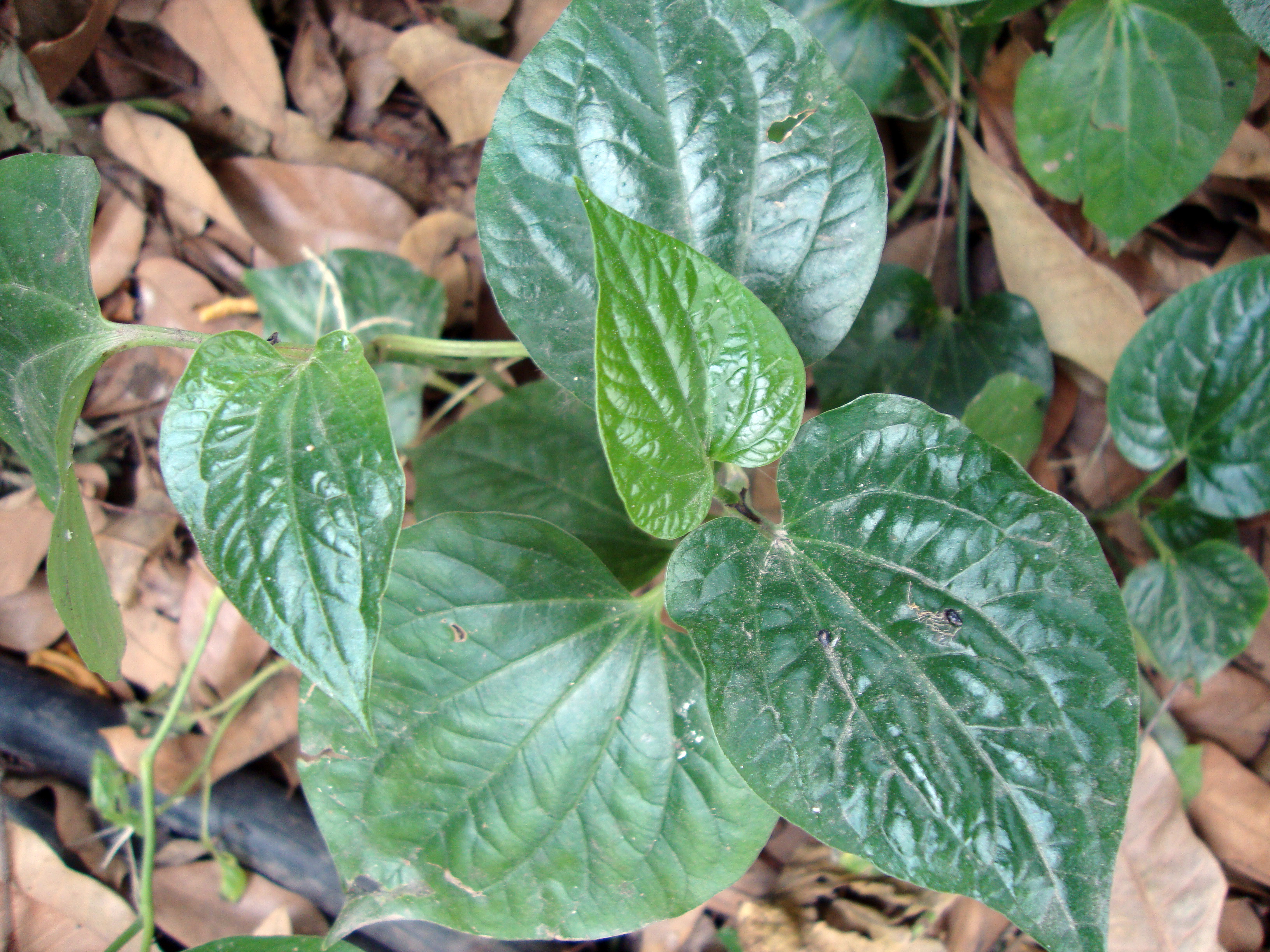 Piper lolot C.DC., 1898Tiếng Việt: Lá lốt